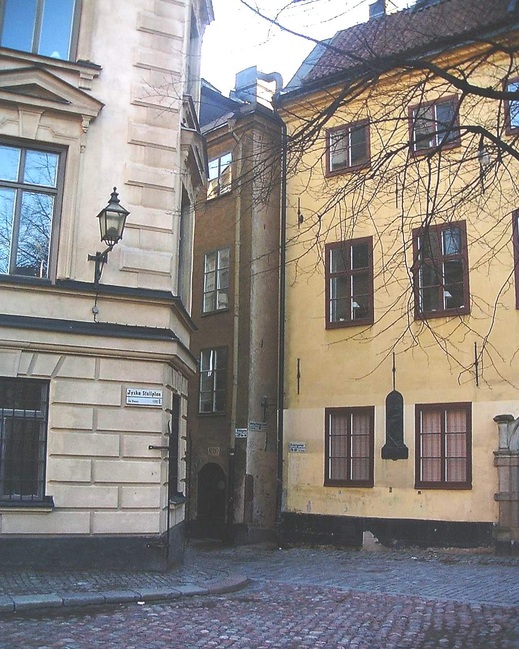 Mårten Trotzigs Gränd in Gamla stan, Stockholm